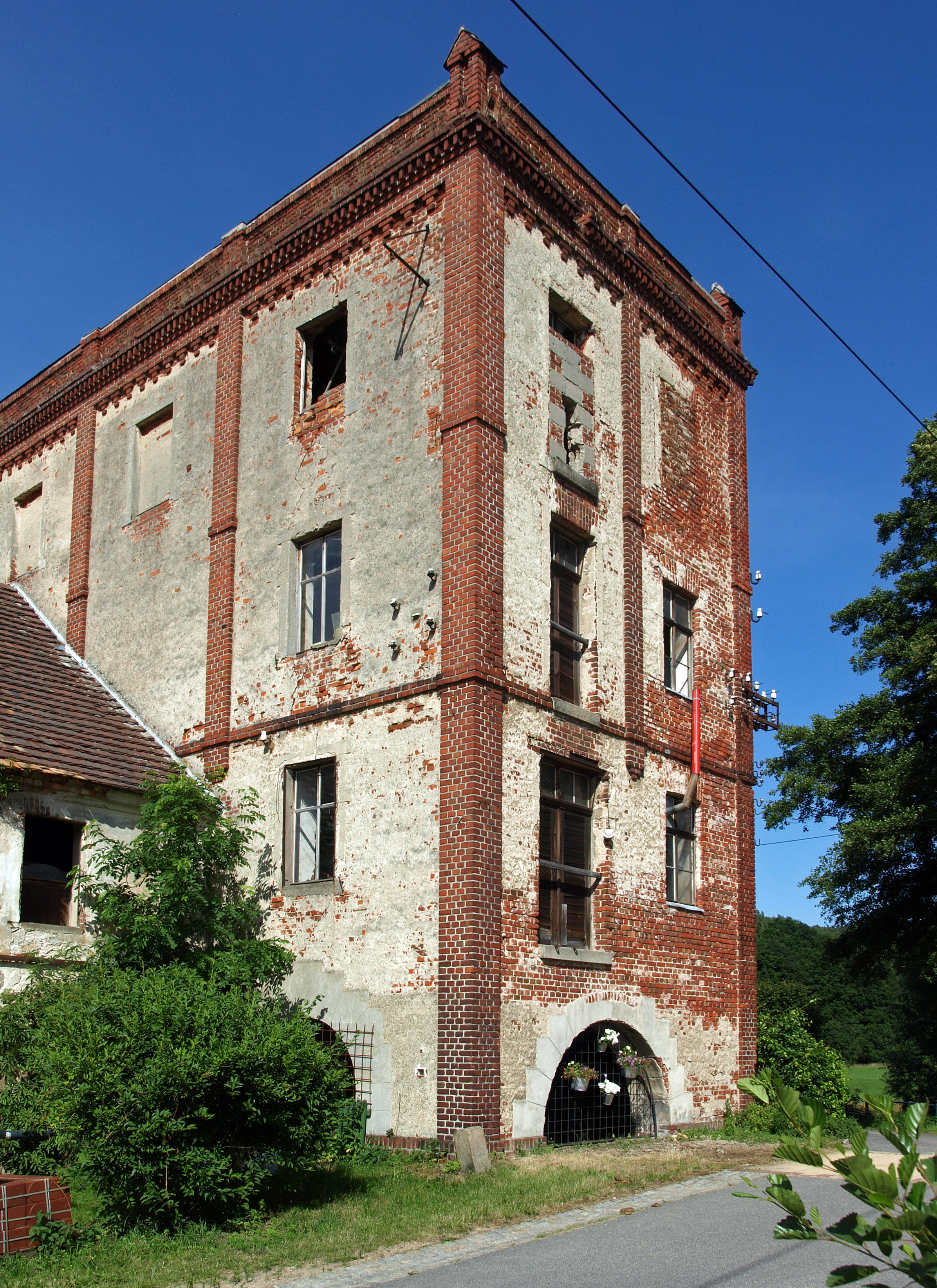 Wassermühle in Rengersdorf